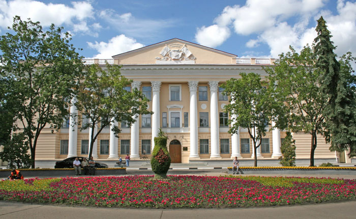 Здание Тамбовского областного краеведческого музея